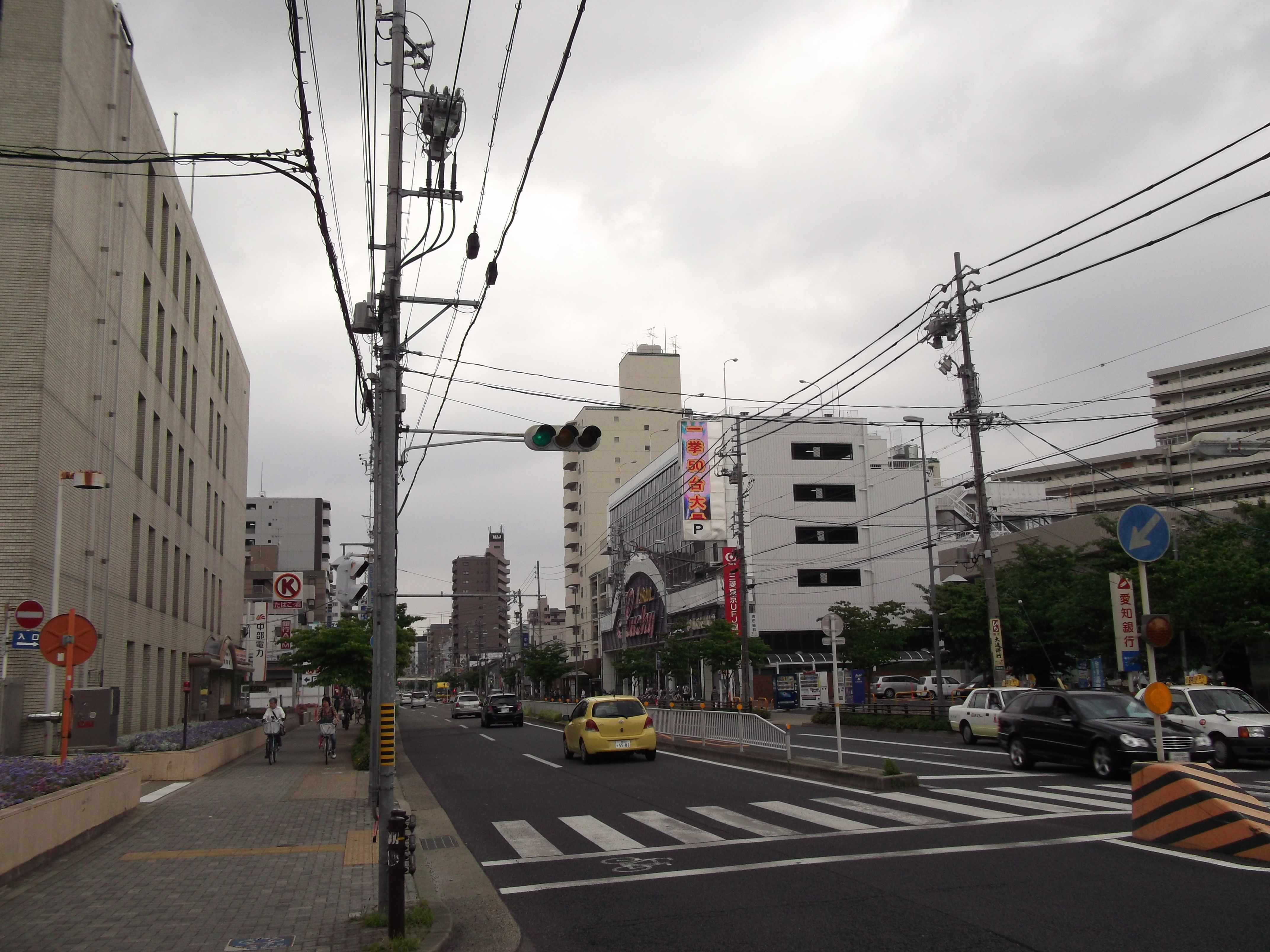 名古屋市北区御成通の様子。ダイエー上飯田店前の交差点から南側を写す。